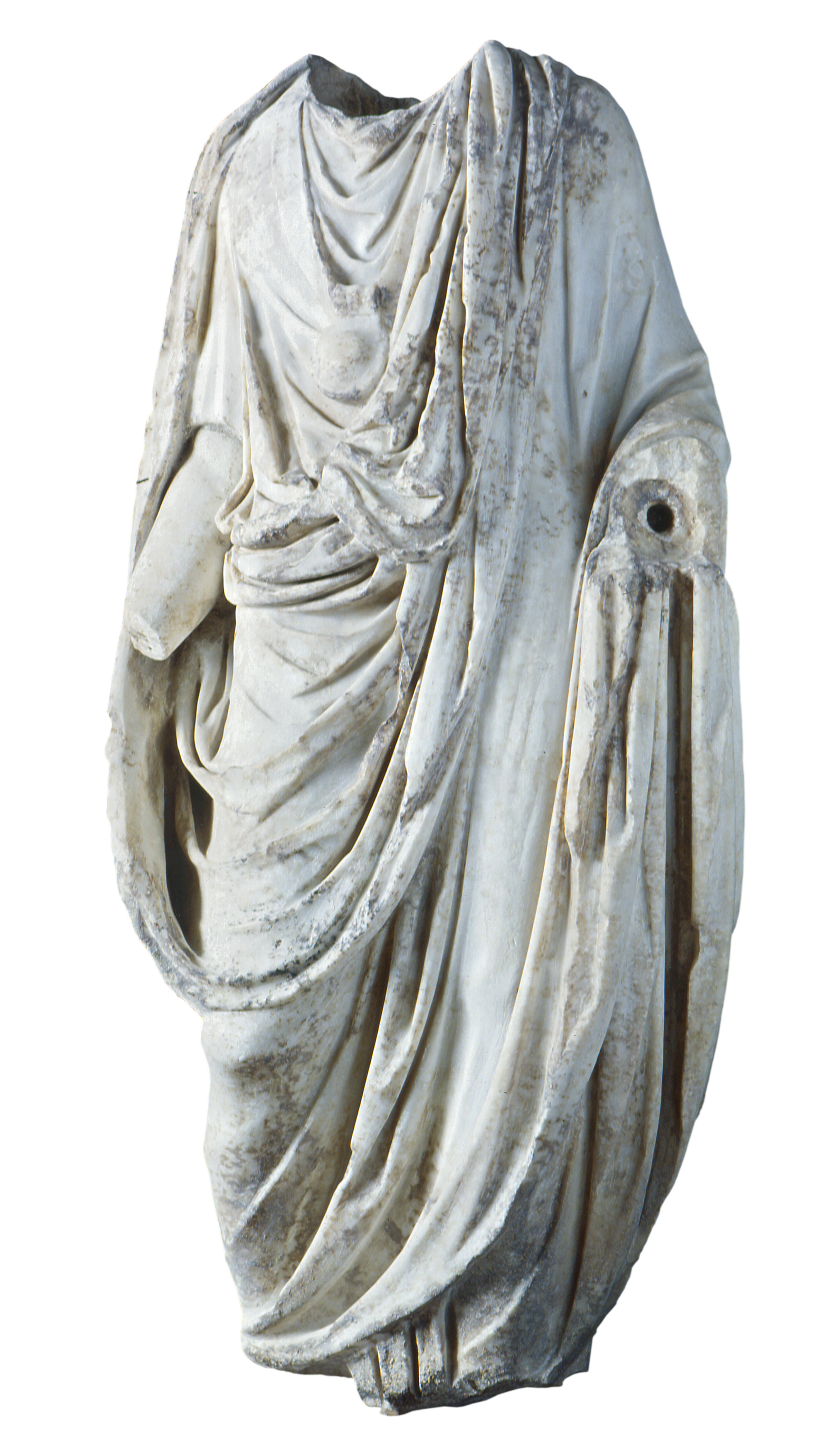 Estàtua procedent del Fòrum de la Colònia Tàrraco, que representa un jove membre de la família imperial julioclàudia abillat amb la toga praetexta. MNAT 382